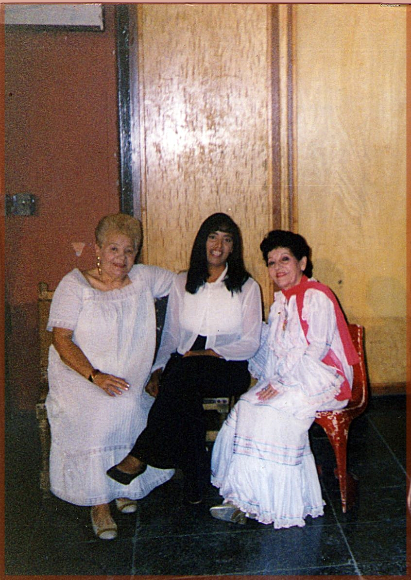 Radeunda Lima una de las compositoras más importantes de la musica campesina cubana.Celina Gonzales conocida como la Reina de la Musica campesina junto a Mariblanca Armenteros una de las cantantes seguidoras de estas dos grandes de la musica campesina.